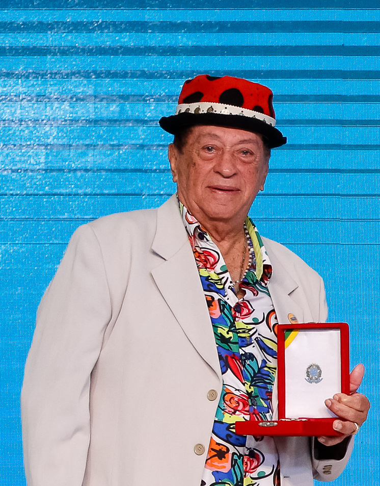 (Brasília - DF, 19/12/2017) Genival Lacerda, recebe a Insígnia da Ordem do Mérito Cultural no Grau de Cavaleiro Foto: Alan Santos/PR